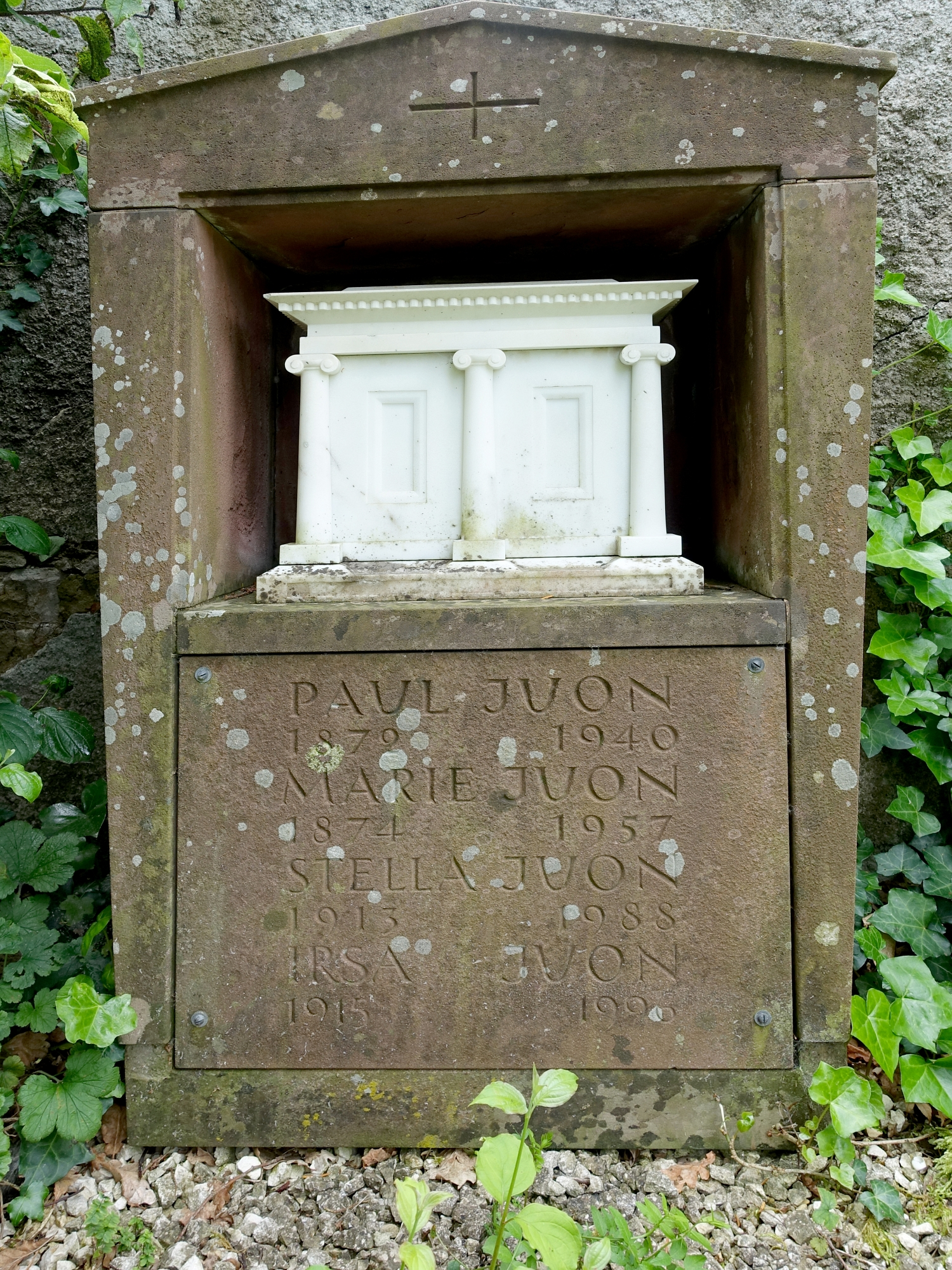 Paul Juon (1872–1940) Komponist. Familien Grab auf dem Friedhof von Langenbruck, Basel-Land, Schweiz. Auch sein Freund der Schweizer Komponist Otto Hegner (1876–1907) ist auf dem Friedhof begraben.